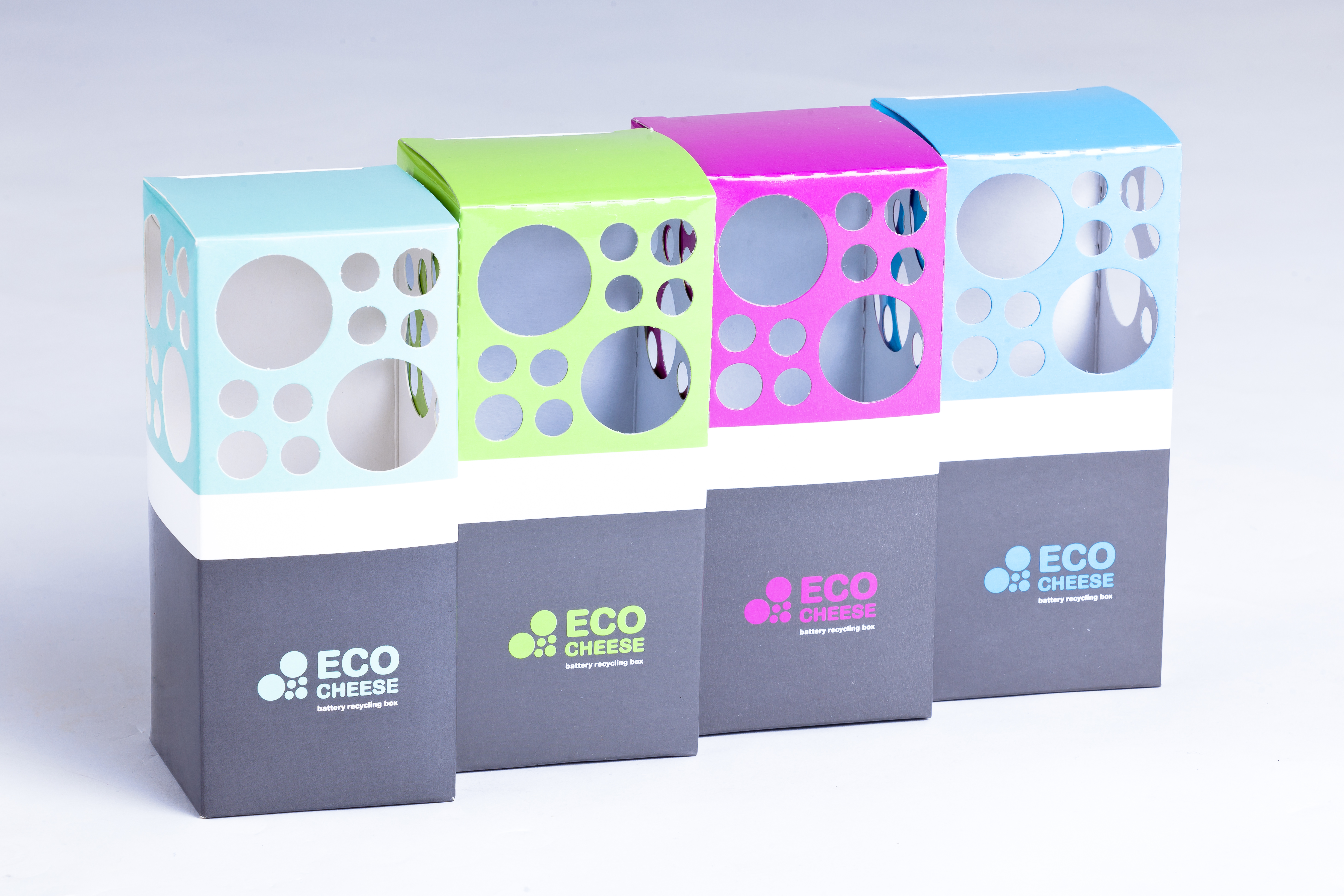 Krabičky ECOCHEESE pro odhazování použitých baterií.